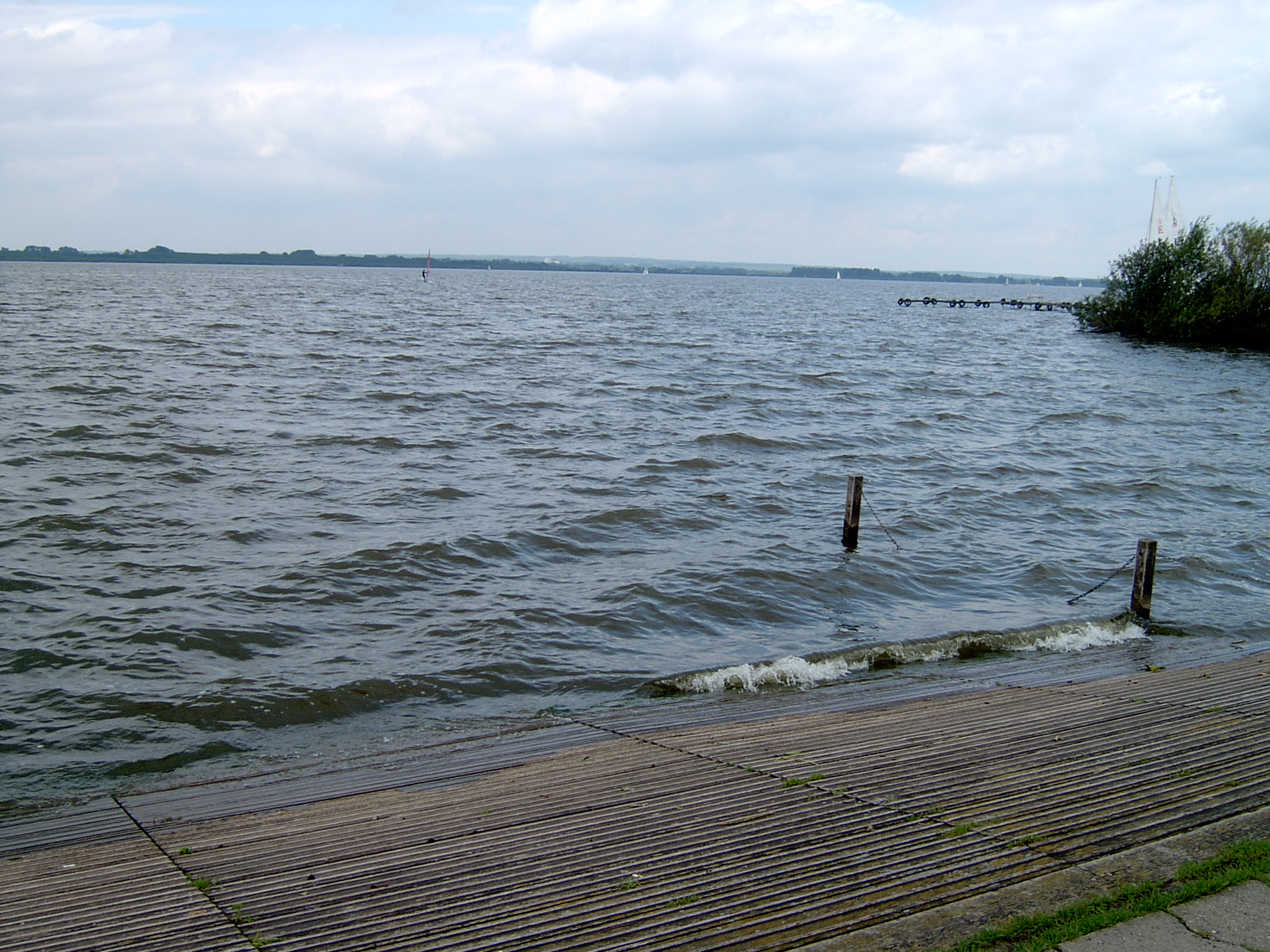 Dümmer selbst fotografiert GNU-FDL